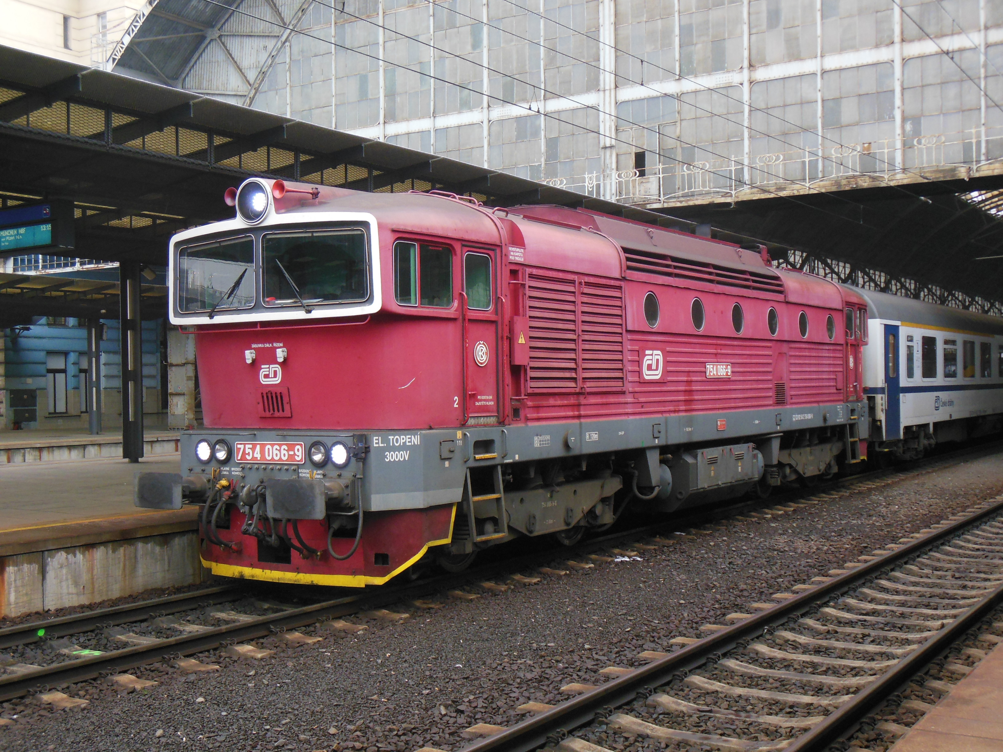 Praha-Vinohrady. Ledovková kalamita 2. prosince 2014, motorová lokomotiva na expresu 352 směr Munchen hbf.